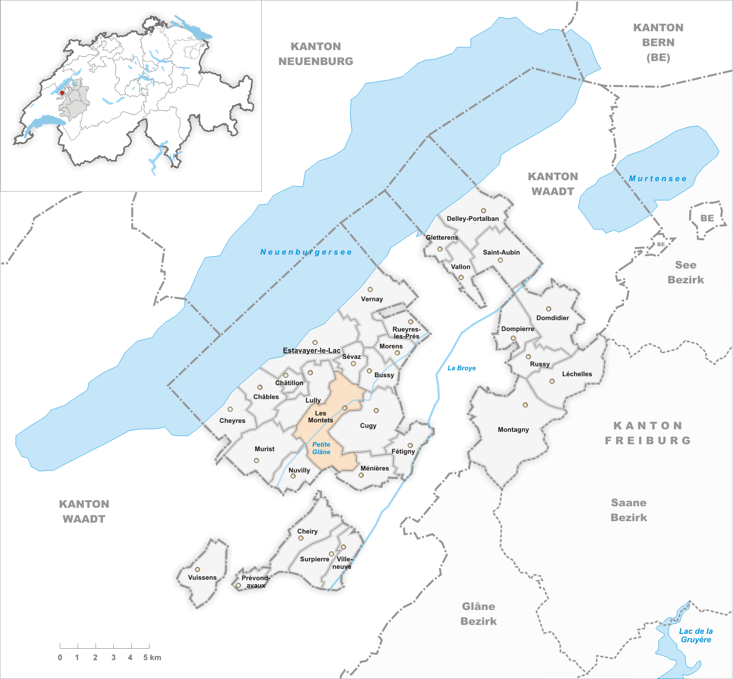 Municipality Les Montets